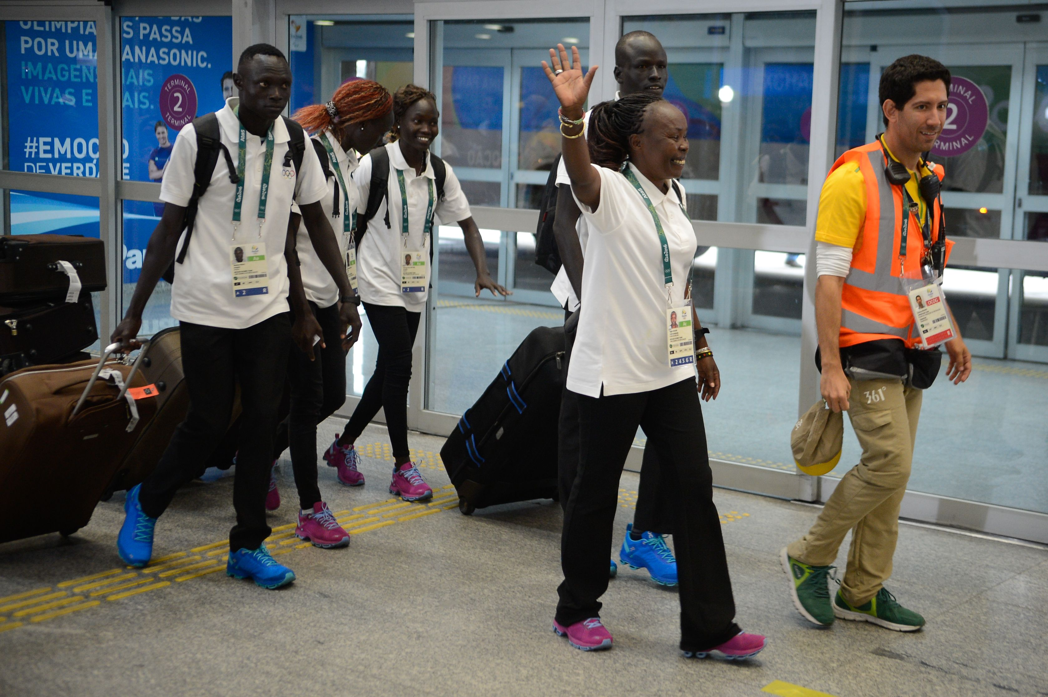 Rio de Janeiro - Integrantes da Equipe OlГ­mpica de Atletas Refugiados desembarcam no RioGaleГЈo. Os atletas sГЈo refugiados do SudГЈo do Sul que vivem no QuГЄnia e disputarГЈo diferentes modalidades de corrida nas competiГ§Гµes de atletismo ( Tomaz Silva/AgГЄncia Brasil)